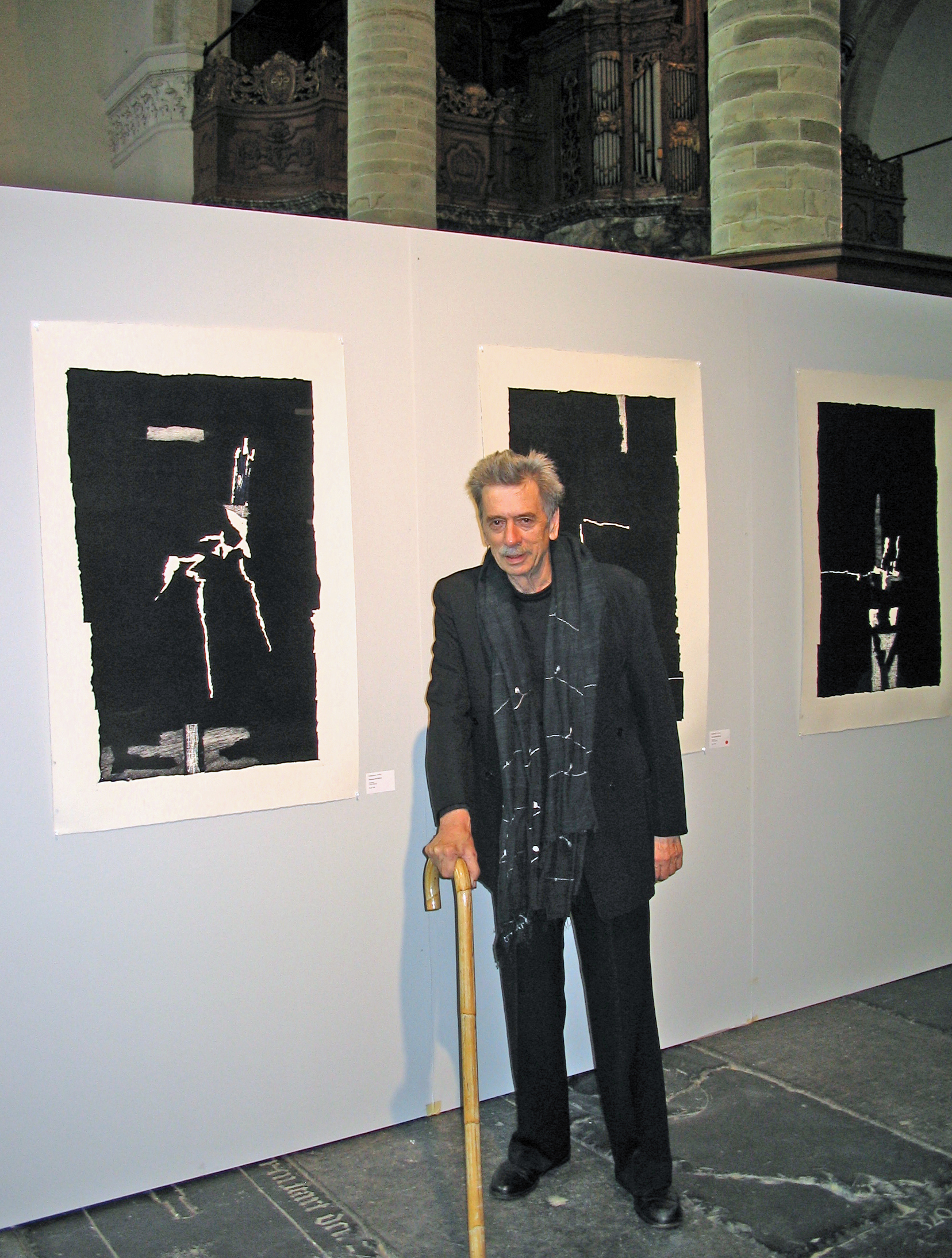 Portret van de graficus Guillaume Le Roy